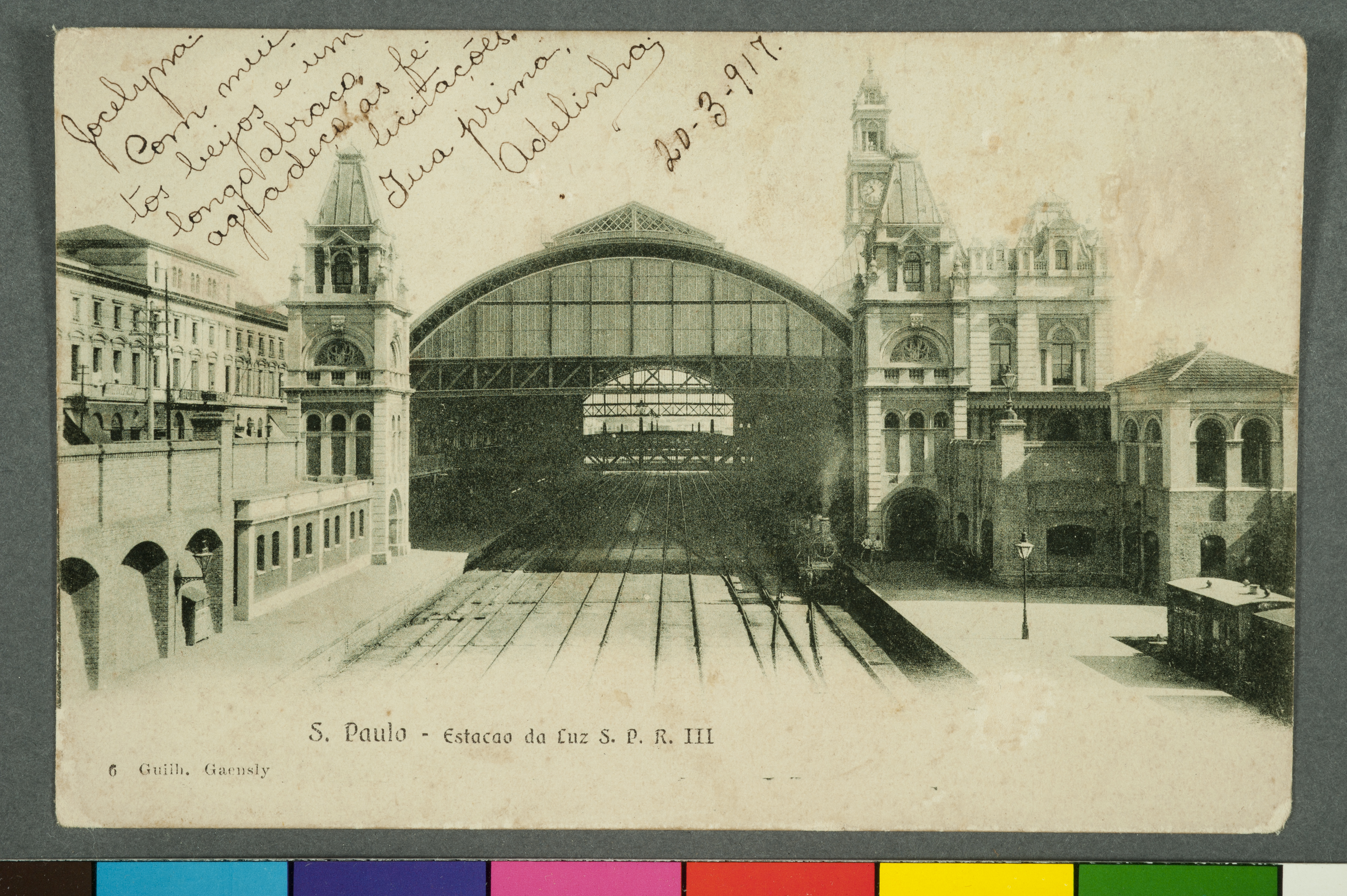 Obra que integra o acervo do Museu Paulista da USP.